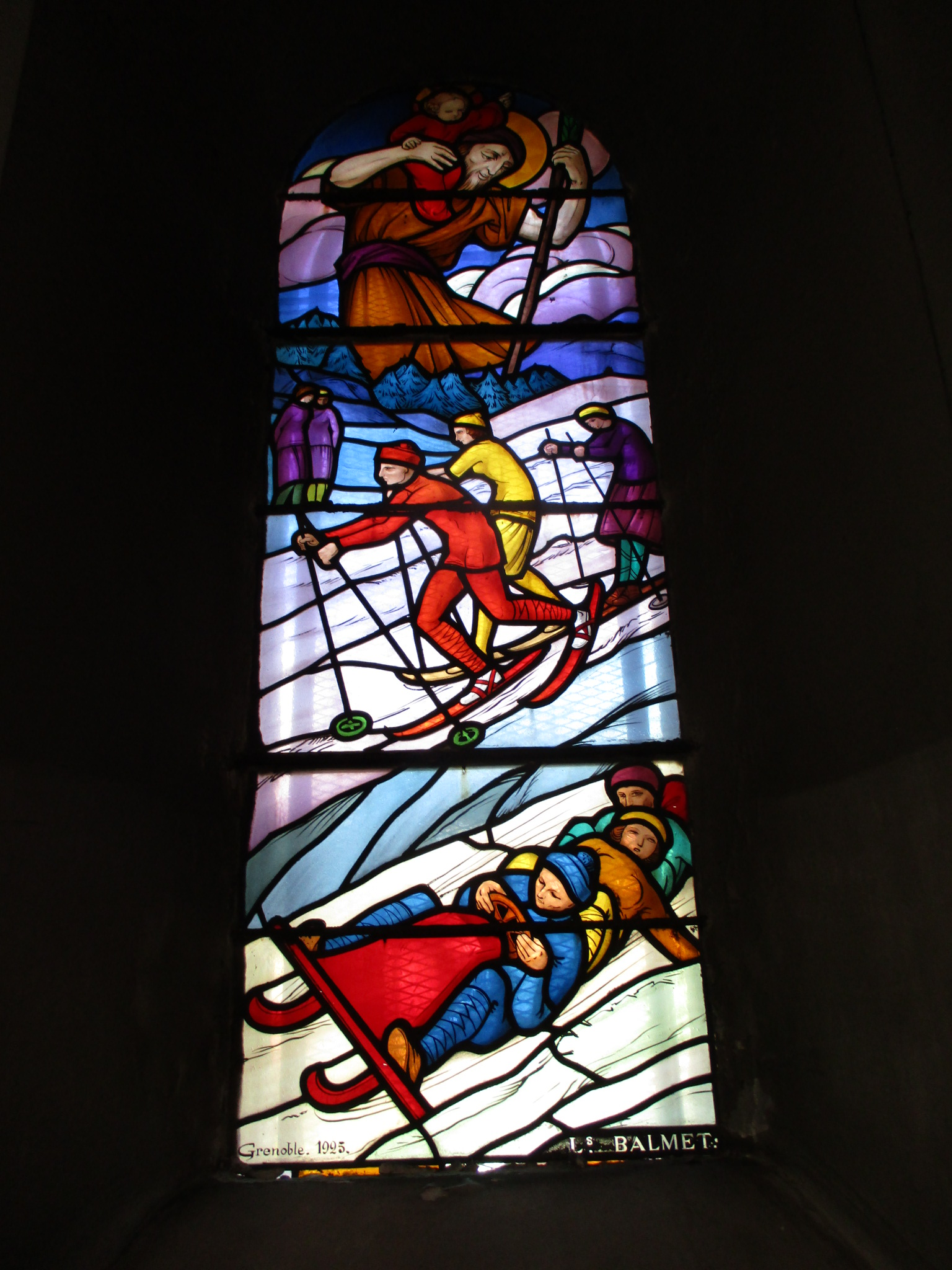 Intérieur de l' Église Saint-Michel de Chamonix-Mont-Blanc